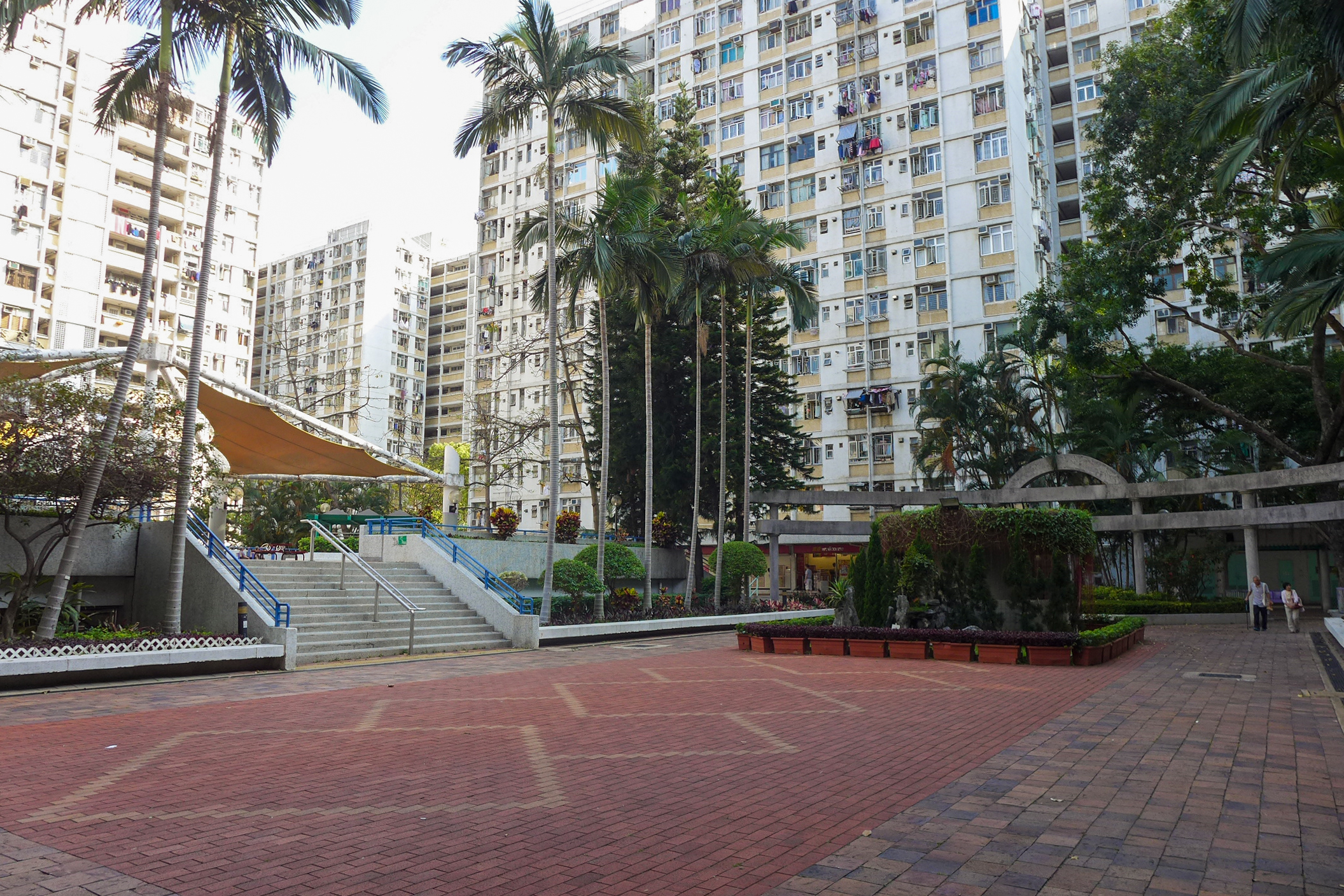 Nam Cheong Estate